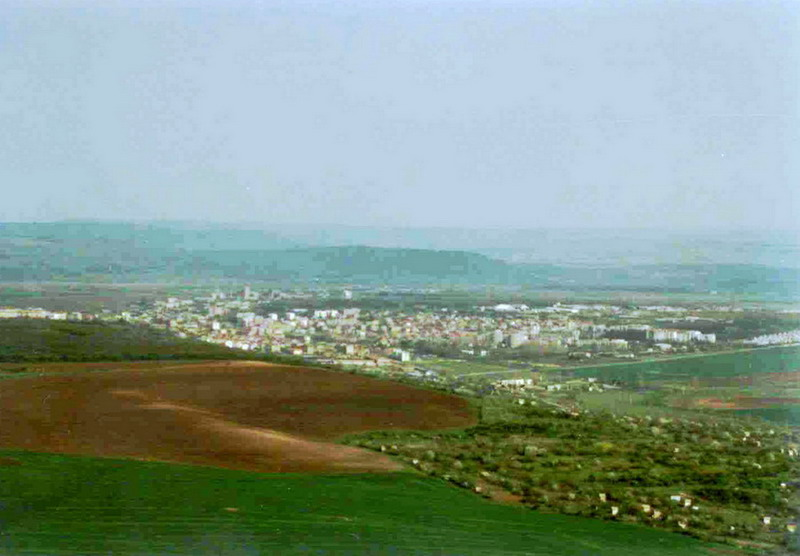 Панорамна снимка на град Попово, направена надвечер от въздуха северозападно от града от хеликоптер - 2004 год.